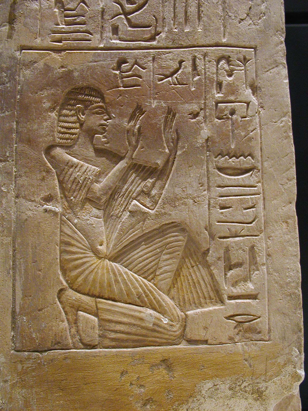 Antiquité égyptienne, Montant de porte du tombeau de Houy le cadet Musée du Louvre, Paris, France.